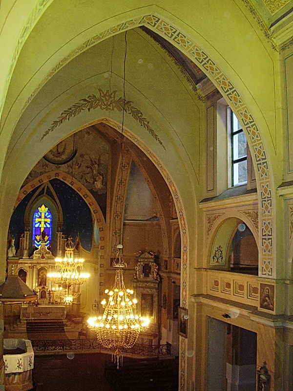 Радунь. Касцёл Маці Божай Ружанцовай. Інтэр'ер